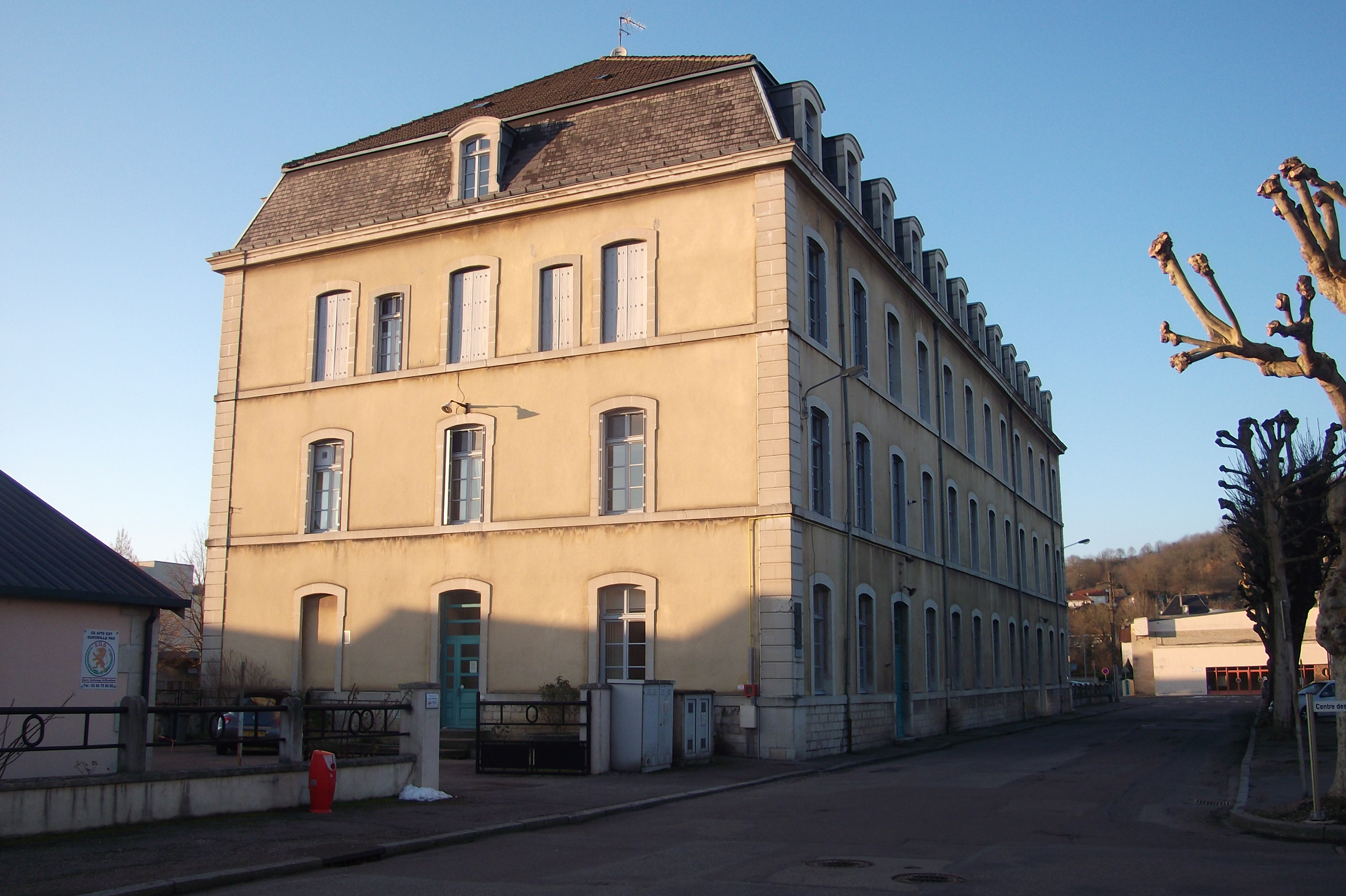 Le Lycée Luxembourg de Vesoul